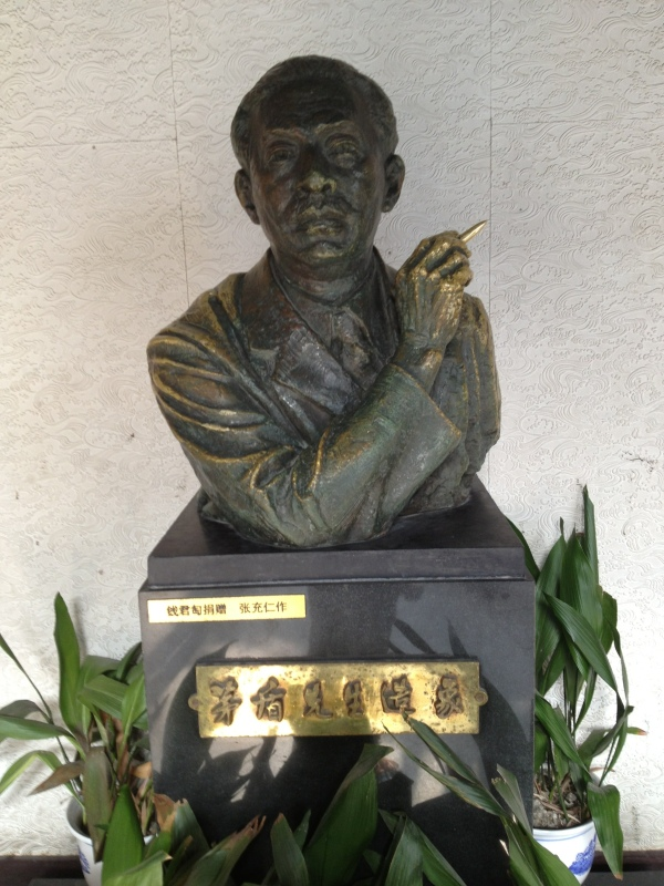 中文（中国大陆）: 茅盾纪念馆内的茅盾塑像